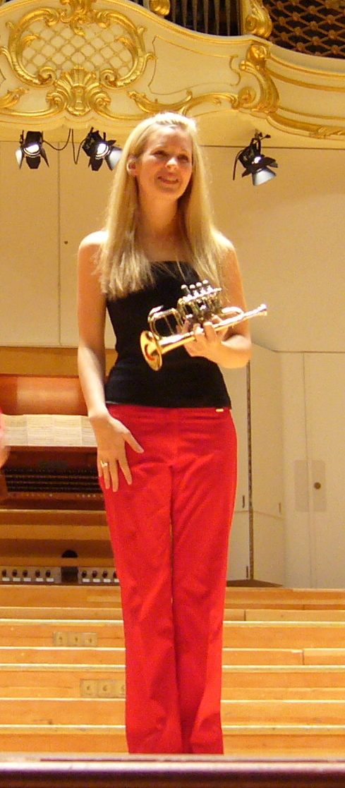 Alison Balsom beim Recital in Hamburg